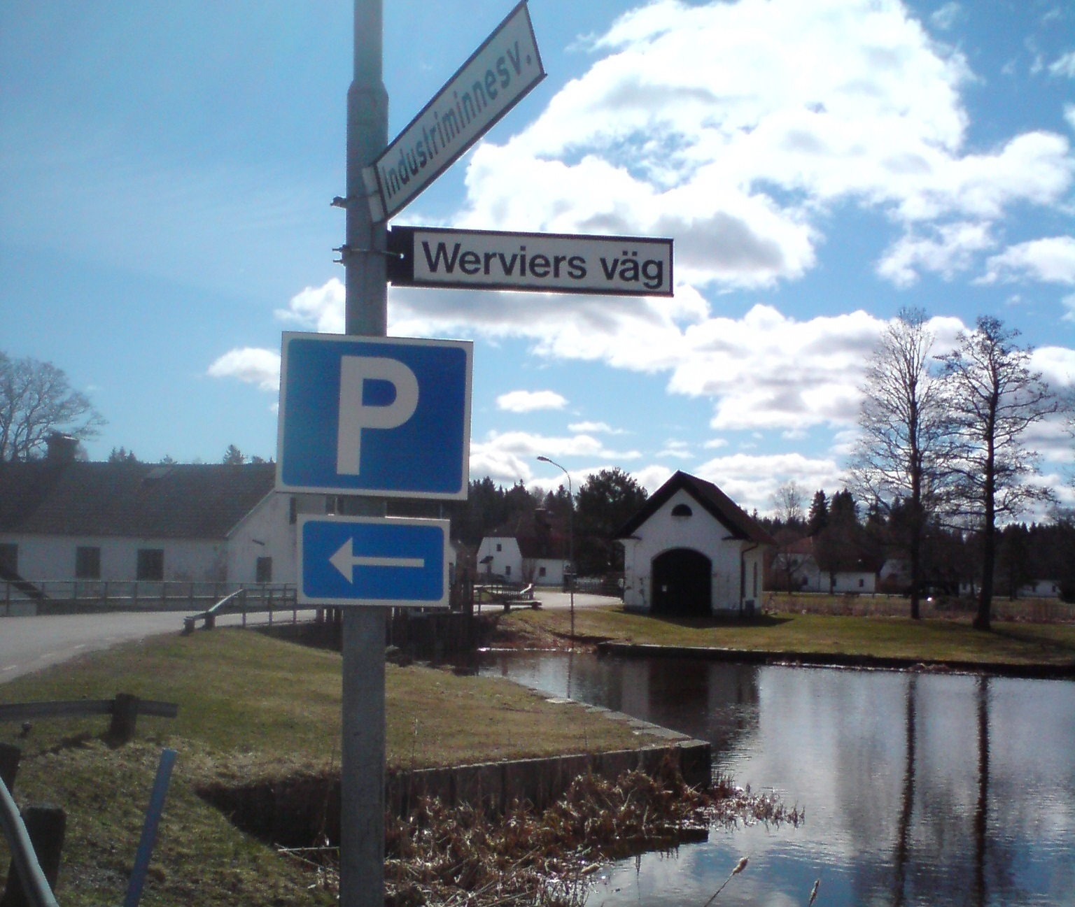 Vy från Strömsbergs bruk vars grundare hette Velam Wervier. Här syns en vy från korsningen mellan Industriminnesvägen och Werviers väg i Strömsbergs bruk. I bakgrunden syns b la Snickeriet, Våghuset. Närmast ligger den gamla kajplatsen.